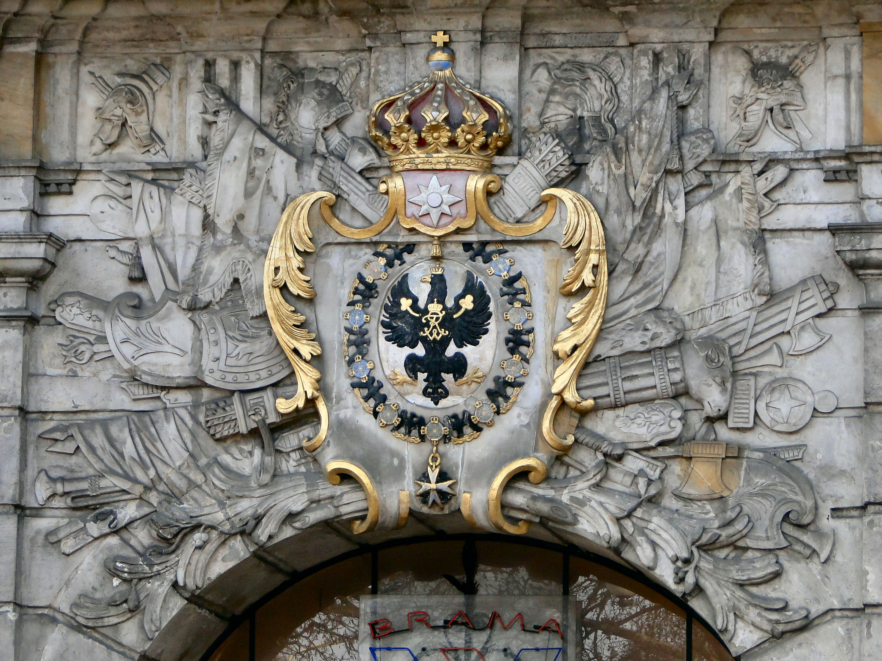 Kartusz z Orłem Pruskim i Orderem Czarnego Orła na północnej elewacji Bramy Królewskiej w Szczecinie